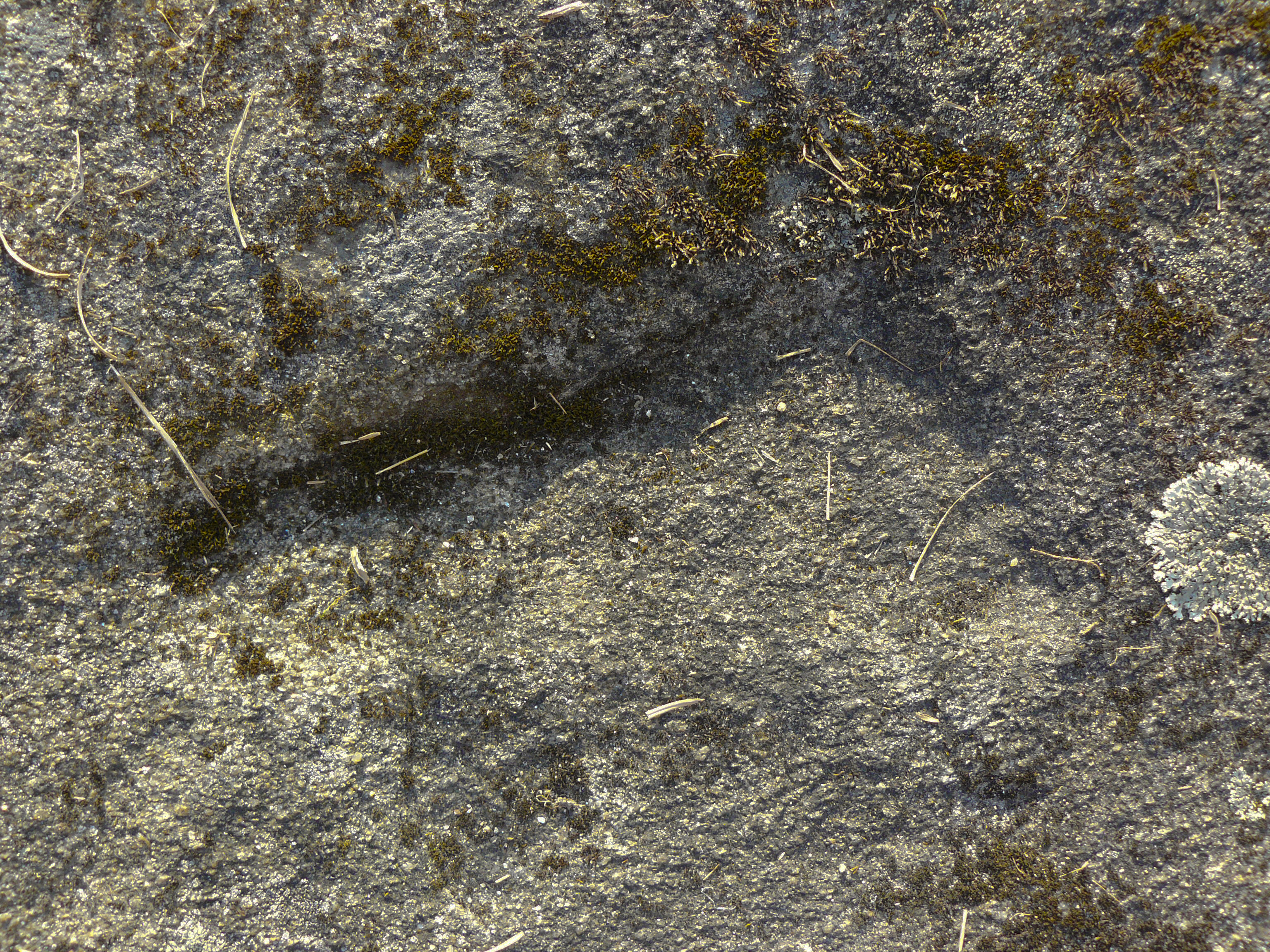 Petróglifo podomorfo do Chan das Ferraduras -Amoeiro - Ourense